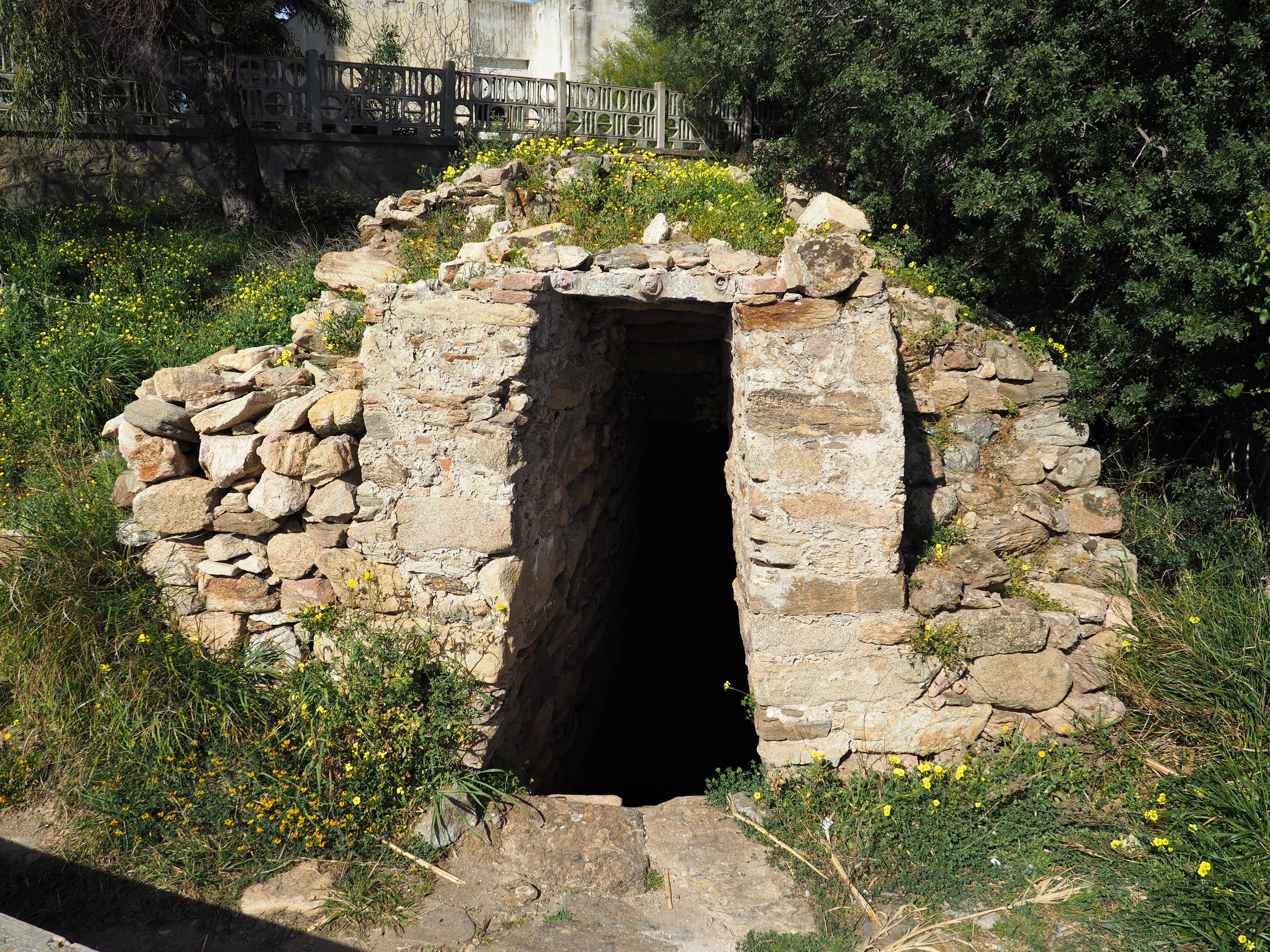 L'ingresso del Pozzo Sacro Nuragico di Milis si trova a Golgo Aranci lungo i binari della ferrovia